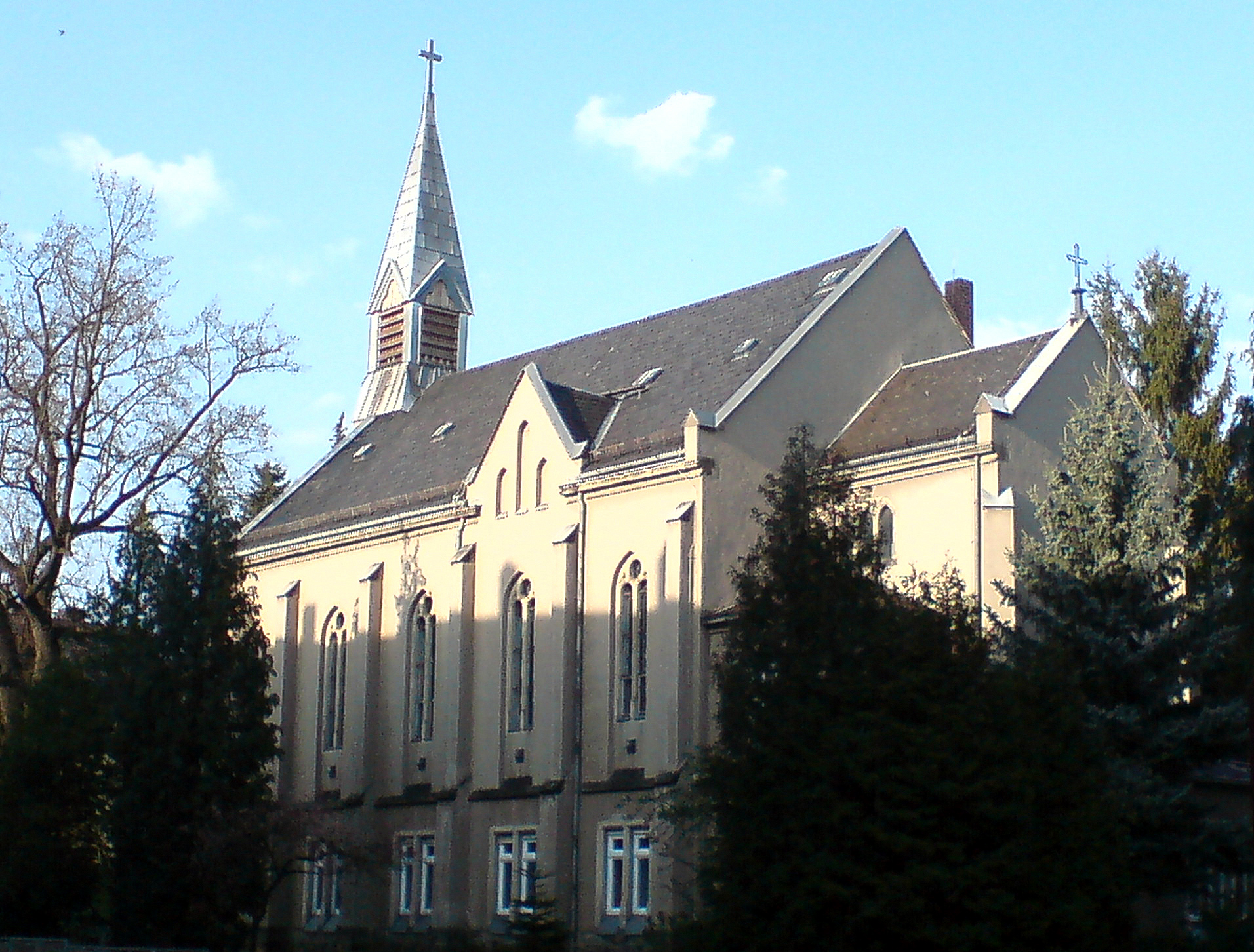 Katholische Kirche in Radeberg